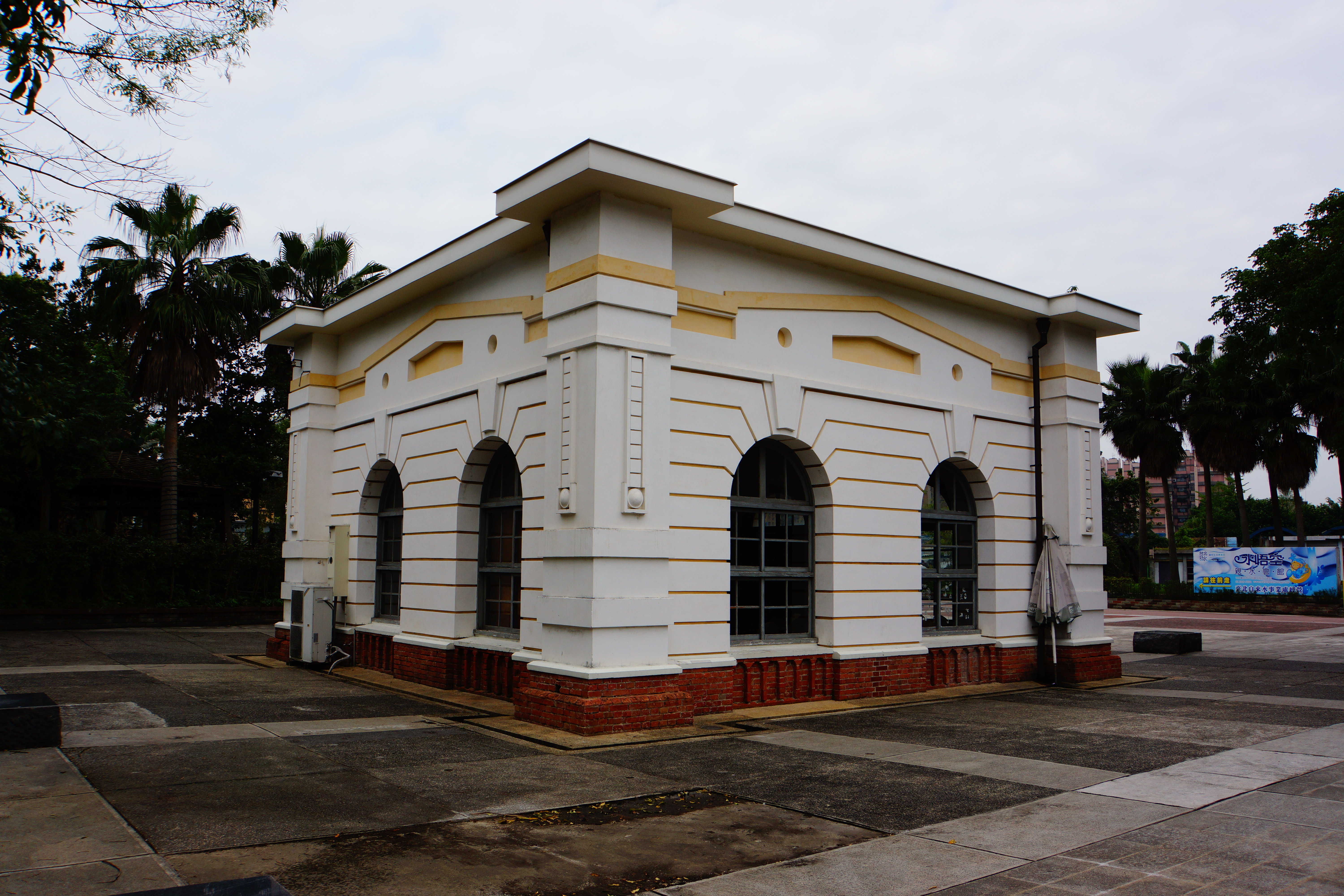 台北自來水園區唧筒室 Pump Room in Taipei Water Park